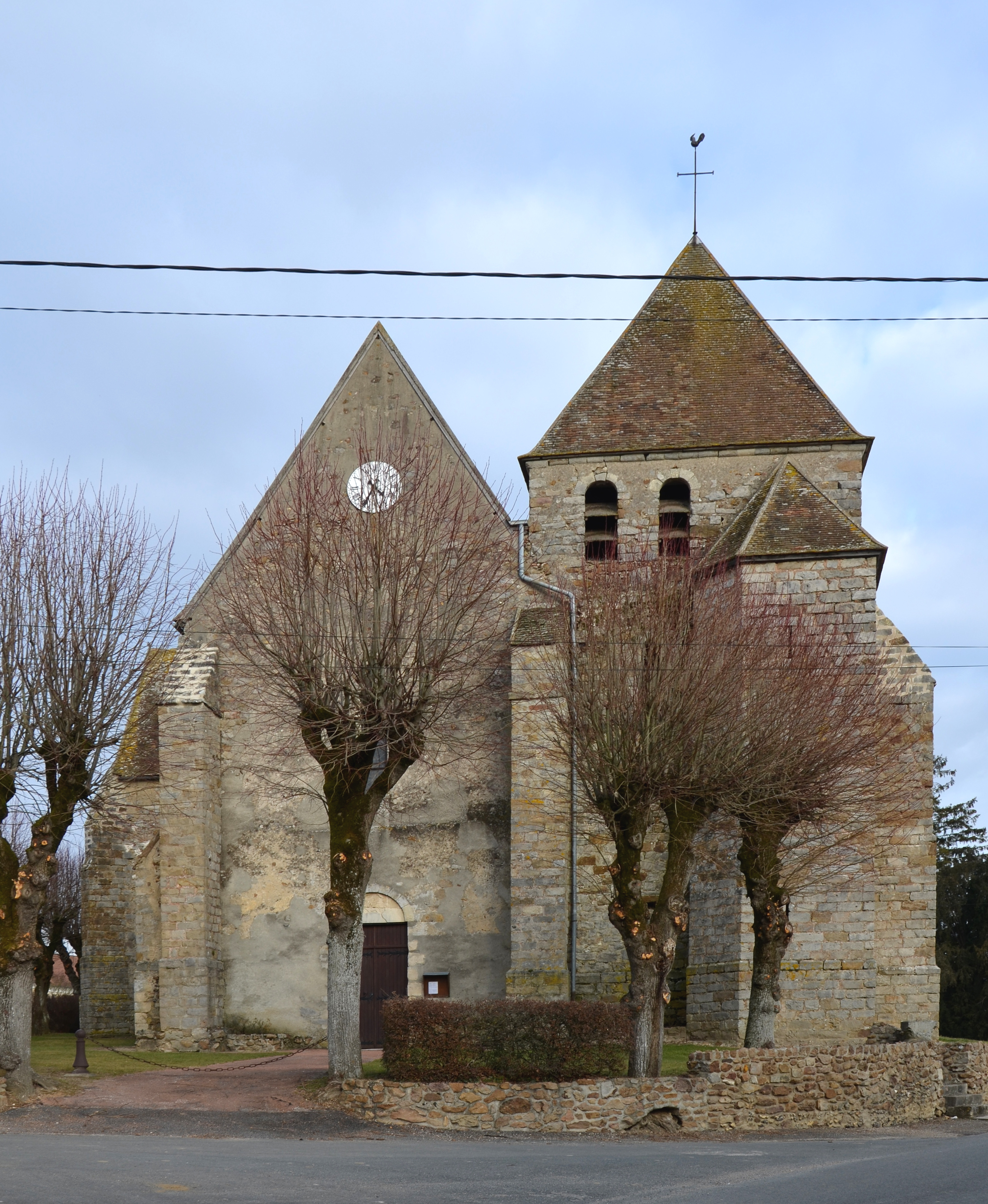 Eglise-de-Nailly, Nailly, France